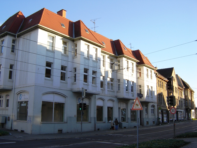 Straße Alt Salbke in Magdeburg-Salbke